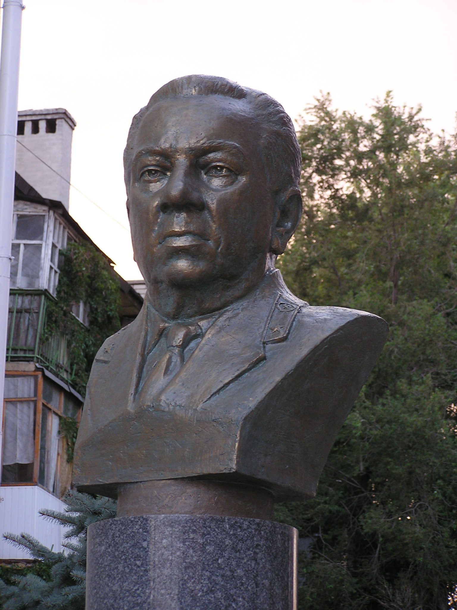 Памятник Александру Астраханю в Донецке